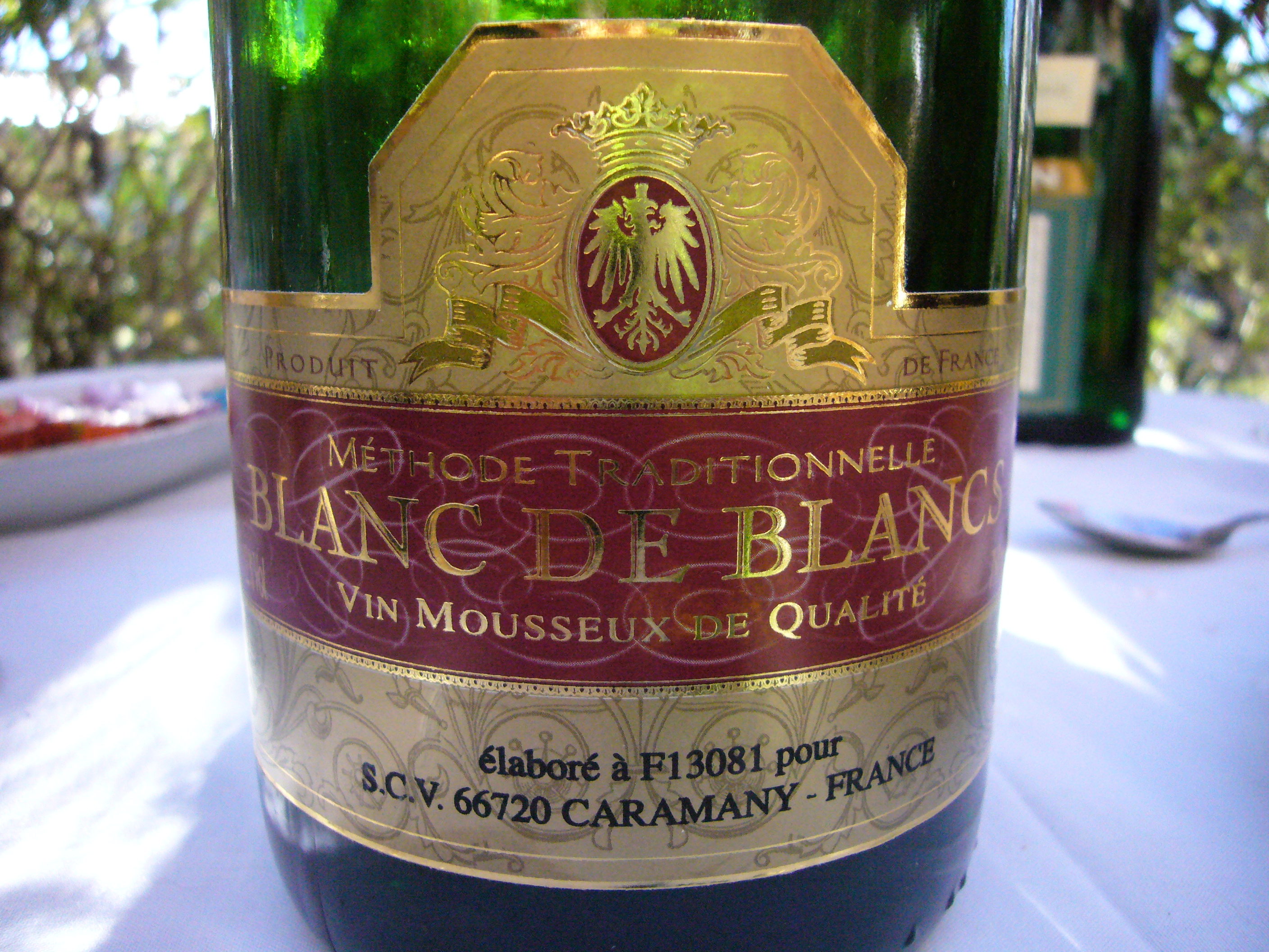 Bouteille de Blanc de Blanc de Caramany (France)